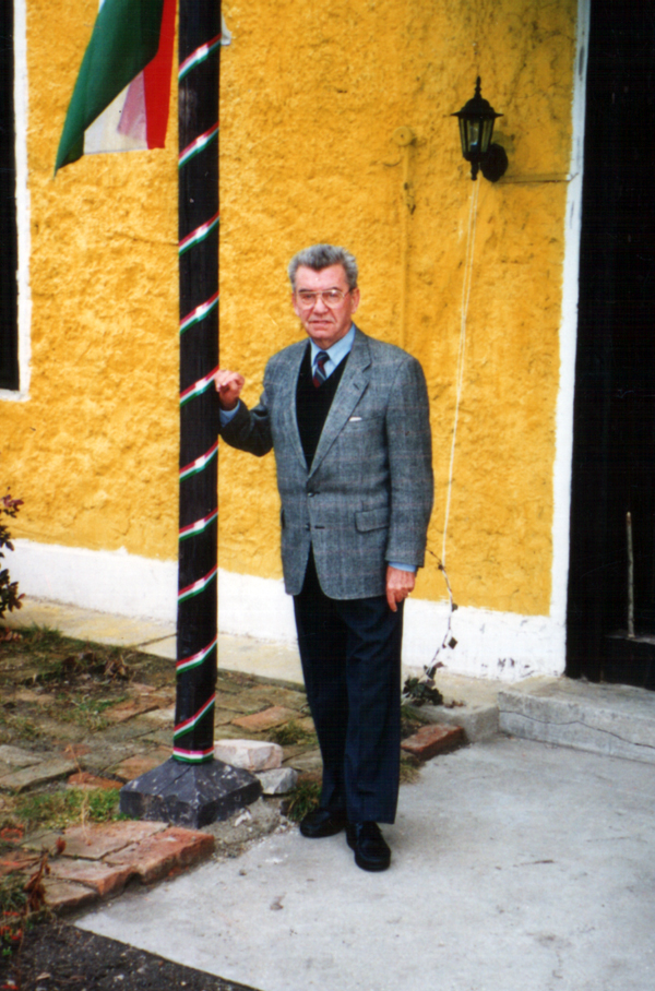 prof. dr. Bejczy Antal fizikus, űrkutató (Besnyő, plébániaház)